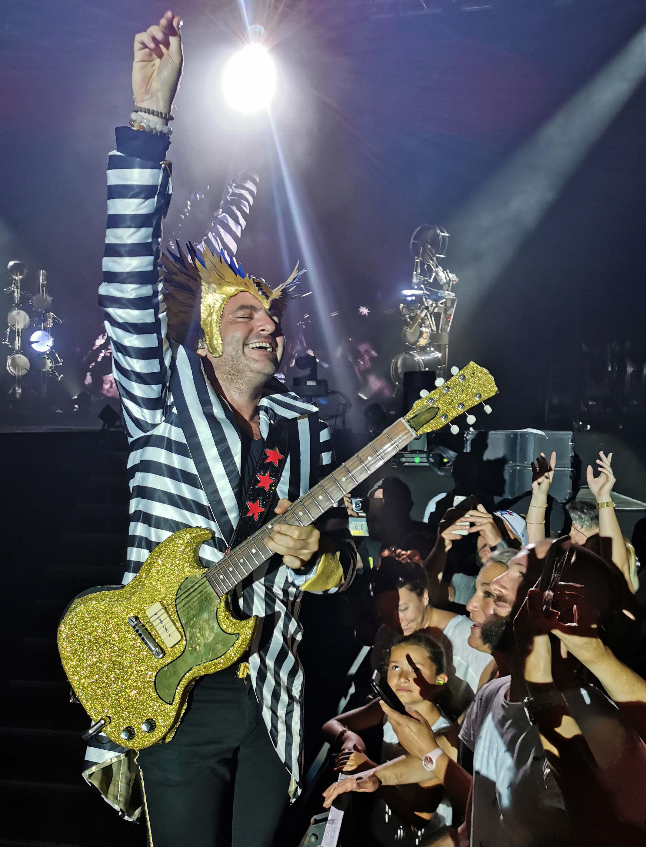 Photographie prise lors du Grand Petit Concert de Matthieu Chedid -M- à Albi, en juillet 2019 (configuration festival)